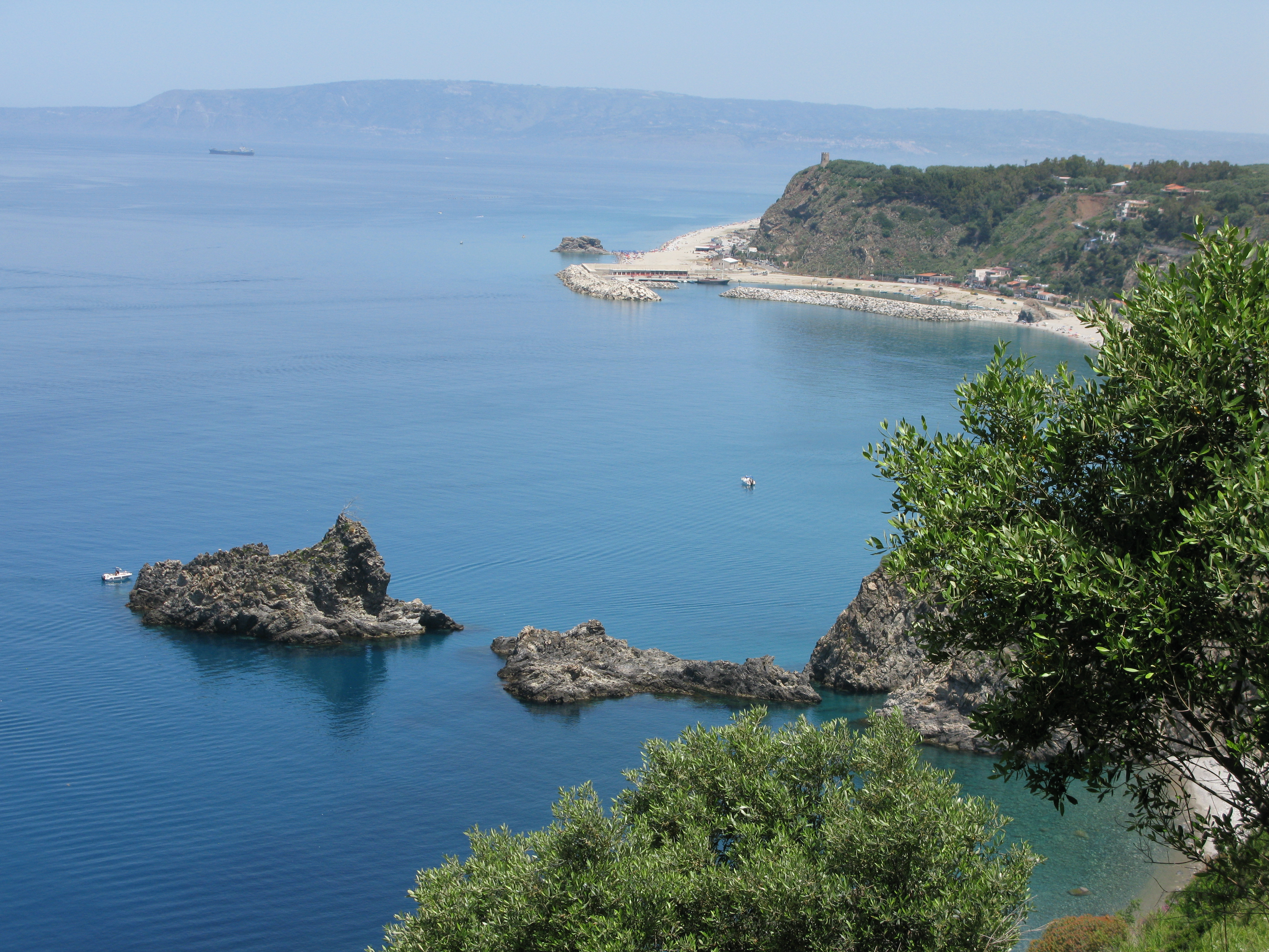 Scoglio dell'Ulivo - Lido di Palmi